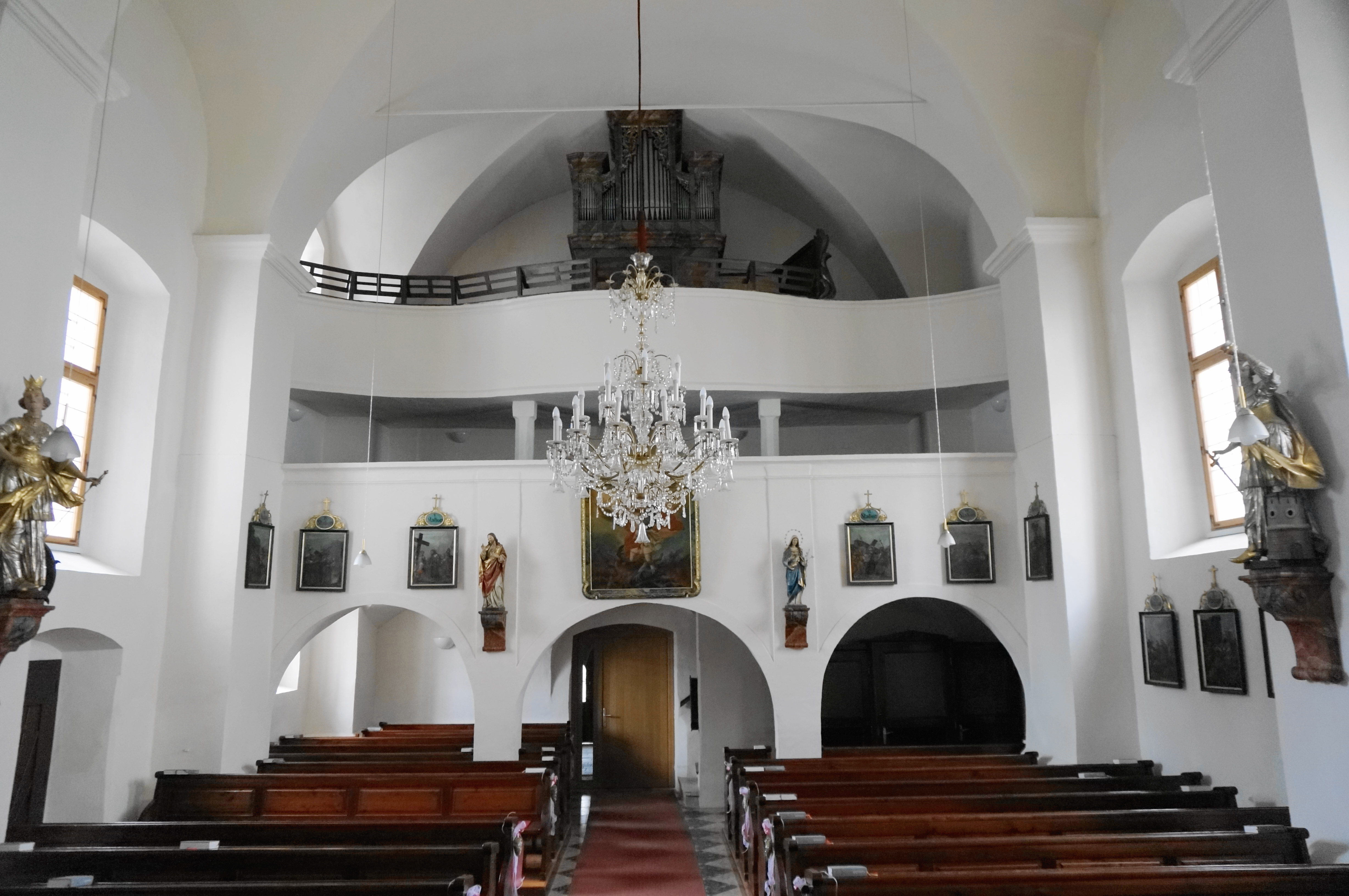 Kath. Filialkirche hl. Ägidius Langhaus, Schiefling, Gemeinde Bad St. Leonhard i.Lav., Bezirk Wolfsberg, Kärnten, Österreich, EU